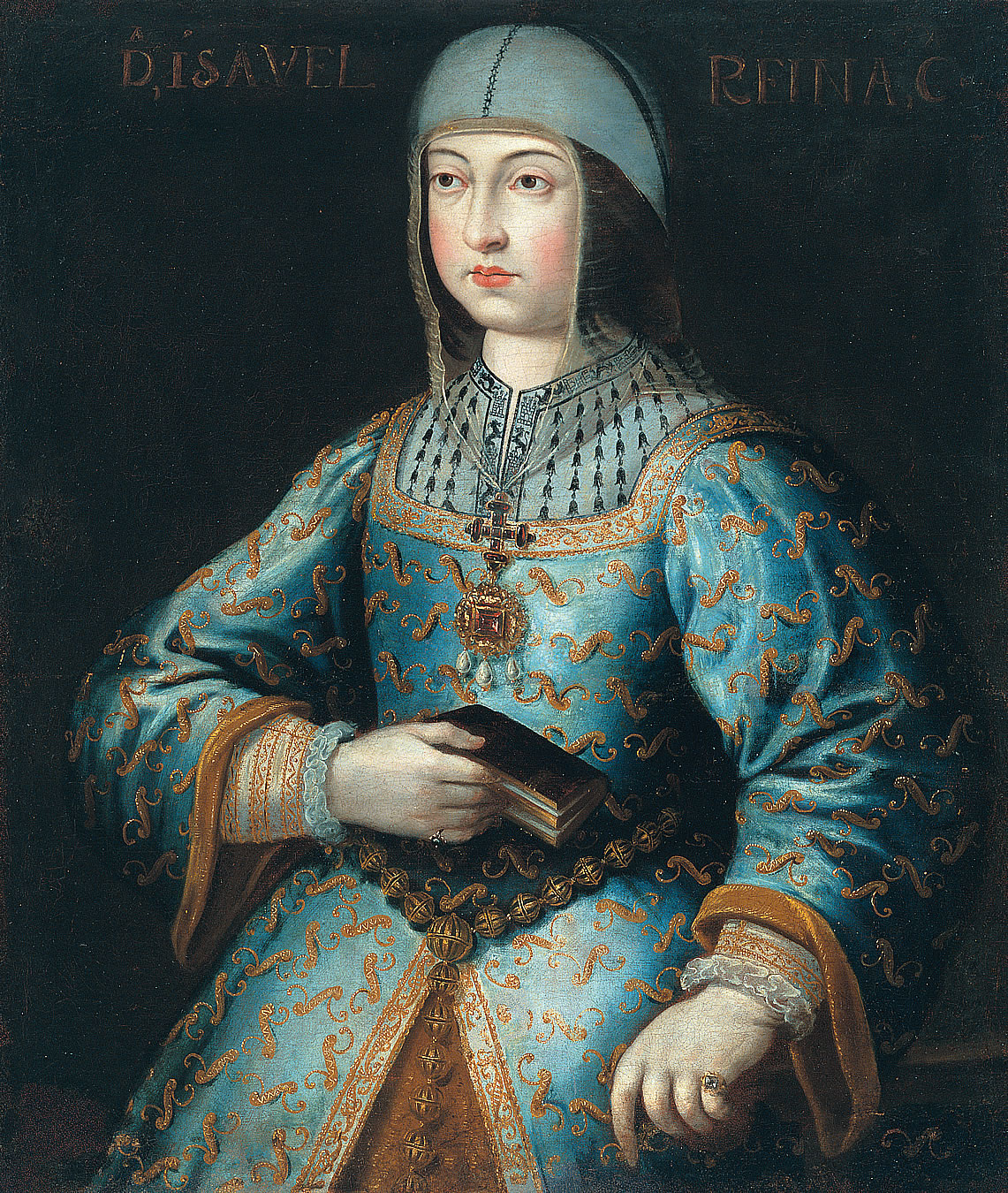 Retrato de la reina Isabel la Católica (1451-1504), que fue hija del rey Juan II de Castilla y de la reina Isabel de Portugal. Este retrato forma parte de la llamada Colección Generalife: grupo de pinturas compuesta por diversos retratos de reyes españoles de la Casa de Austria. Esta colección estuvo en el palacio del Generalife hasta que este edificio pasó a ser propiedad del Estado en 1921, momento en el que pasan a formar parte de las colecciones de la Casa de los Tiros, que estaba ligada al Generalife al pertenecer a los marqueses de Campotéjar, alcaides del Generalife desde el reinado del emperador Carlos V. El origen de esta colección de pintura está en las galerías de retratos que se fueron formando en el Generalife desde la conquista cristiana, ya que el hecho de que este lugar fuera propiedad de la corona hizo llegar, en momentos sucesivos, retratos de los diferentes reyes hasta formar una completa galería. Todos ellos son copias efectuadas en los siglos XVI y XVII de las obras que los retratistas del rey pintaban en la corte, copias que se realizaban en el mismo taller del pintor de los retratos oficiales. Este retrato de Isabel la Católica, junto con el de Fernando el Católico, ambos de medio cuerpo y vistiendo ricos trajes de corte, son los más antiguos de la colección. Son obras de autor anónimo, de antiguo atribuidas al pintor de la reina católica Antonio del Rincón.